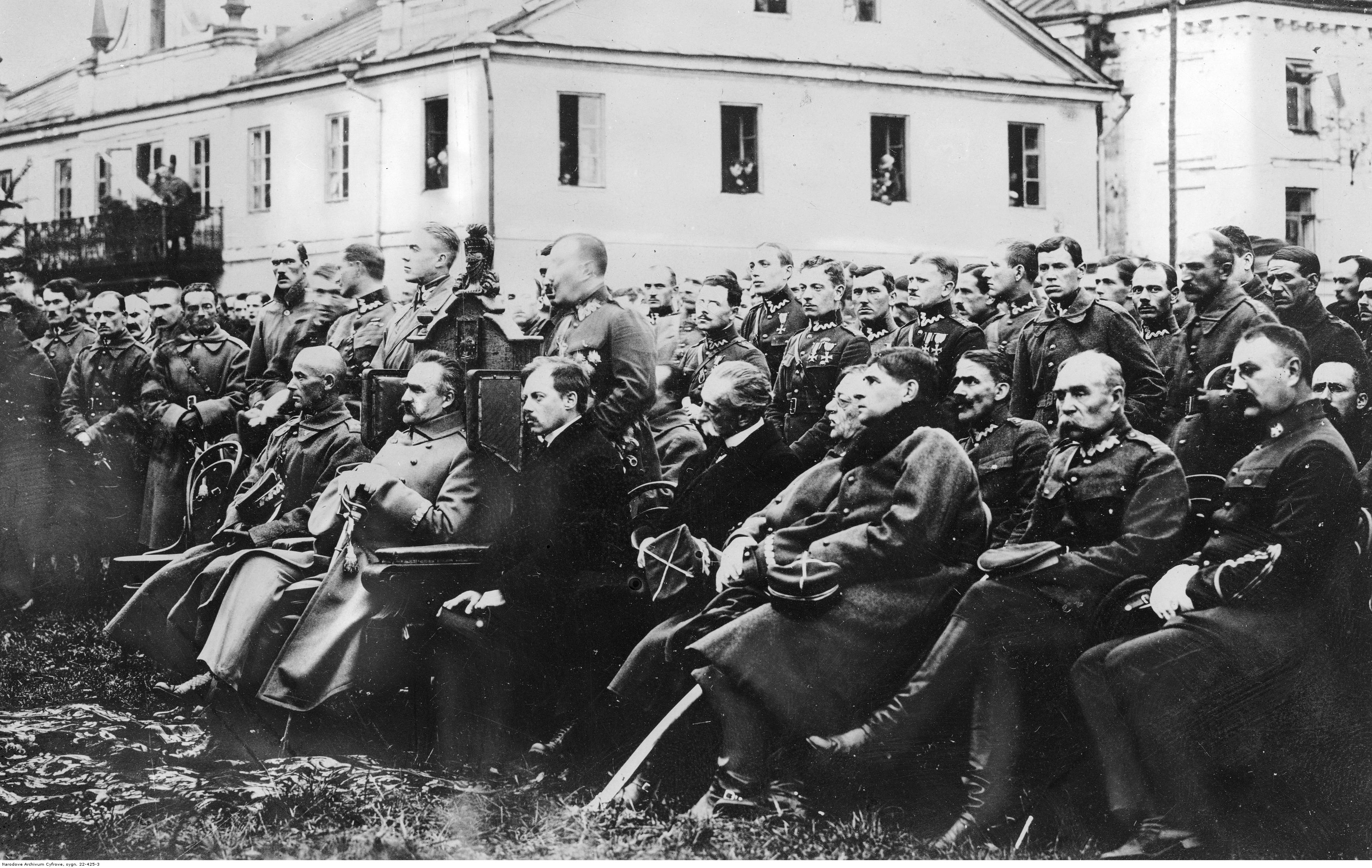 Naczelnik Państwa Józef Piłsudski na mszy polowej. Widoczny m.in. gen. Edward Śmigły-Rydz (na lewo od marszałka).